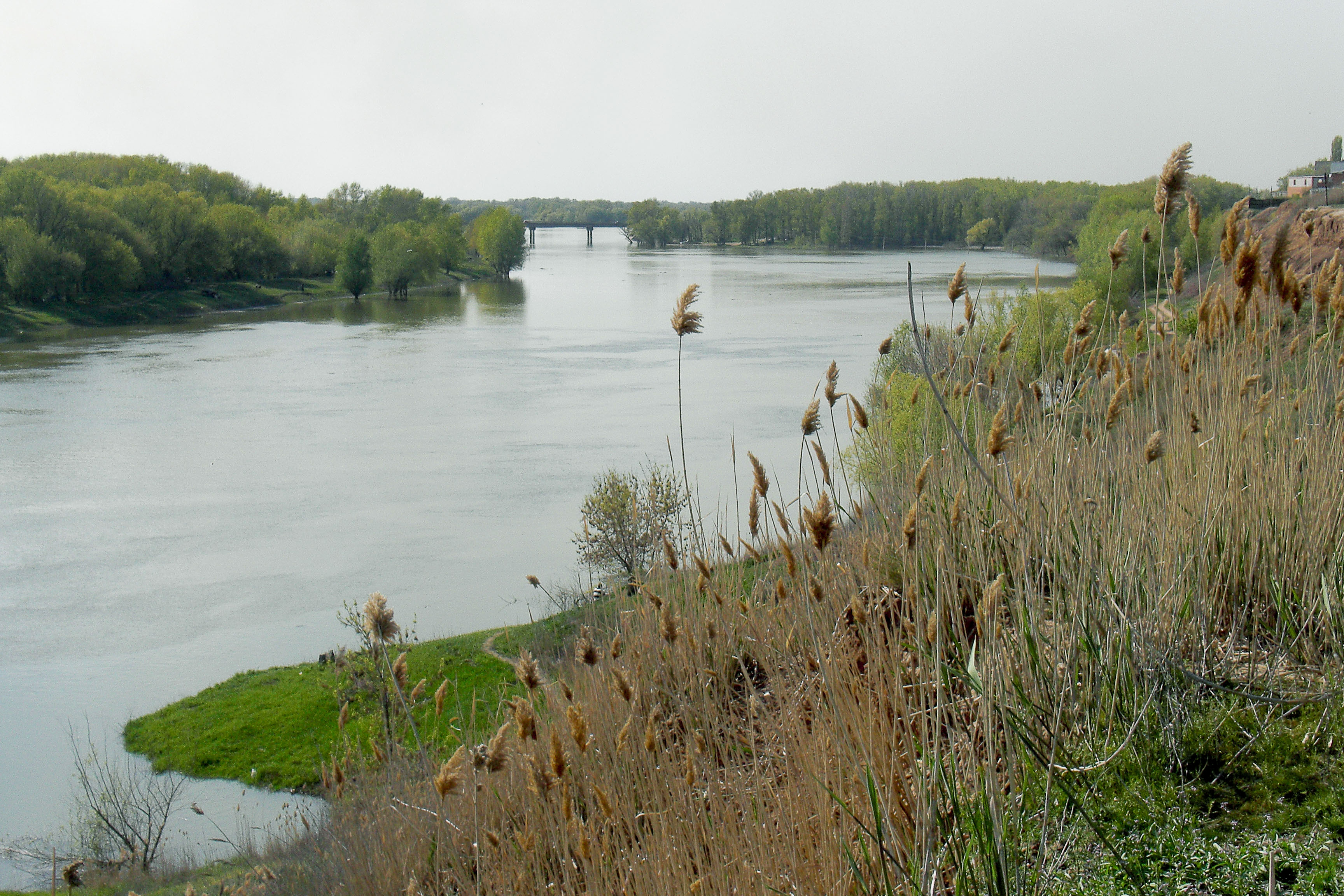 город Ахтубинск, вид от железнодорожного моста на мост между Петропавловкой и центральной частью города. Весеннее половодье.